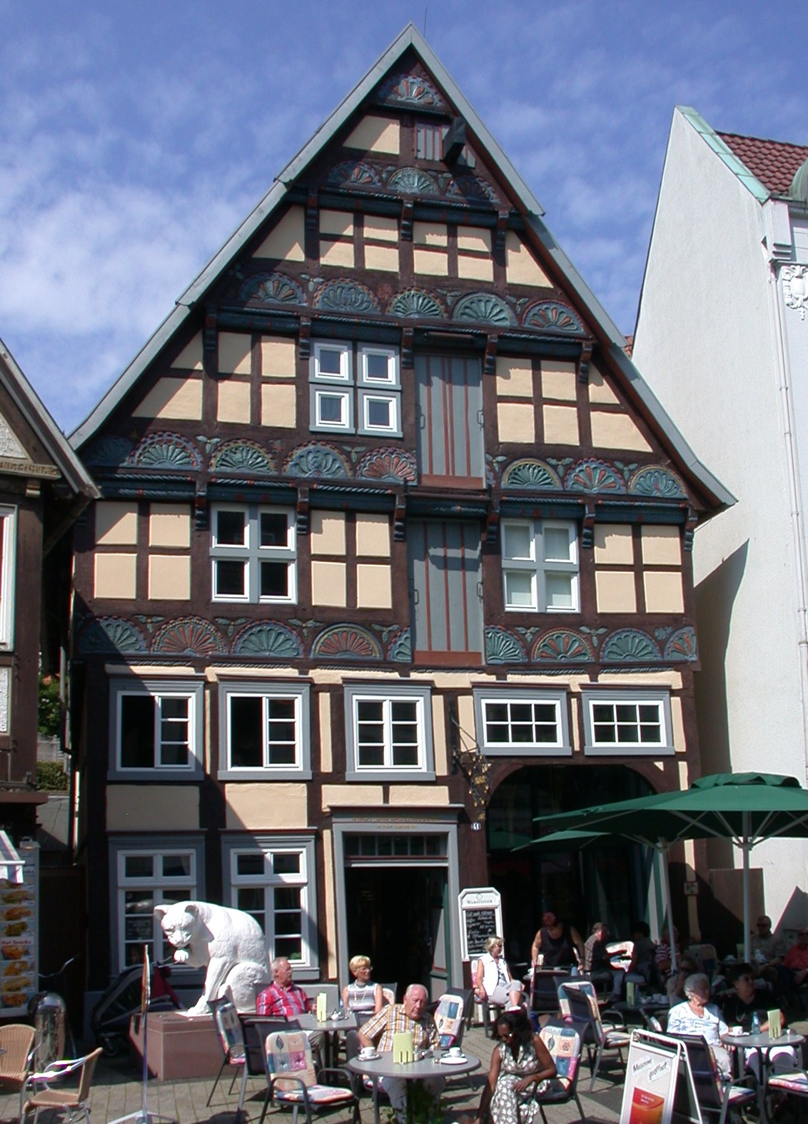 Bad Salzuflen, Lange Straße 41: Bädermuseum